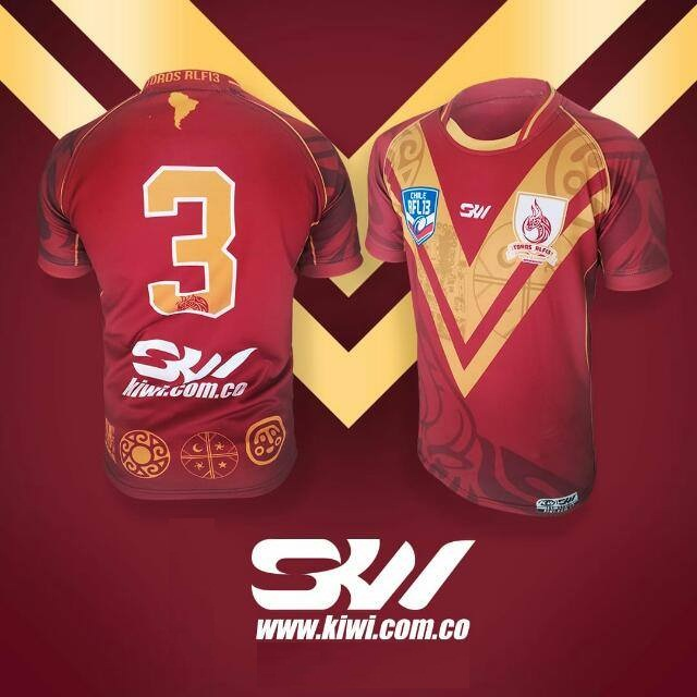 Camiseta Oficial del Club Deportivo Toros RLF13 Antofagasta